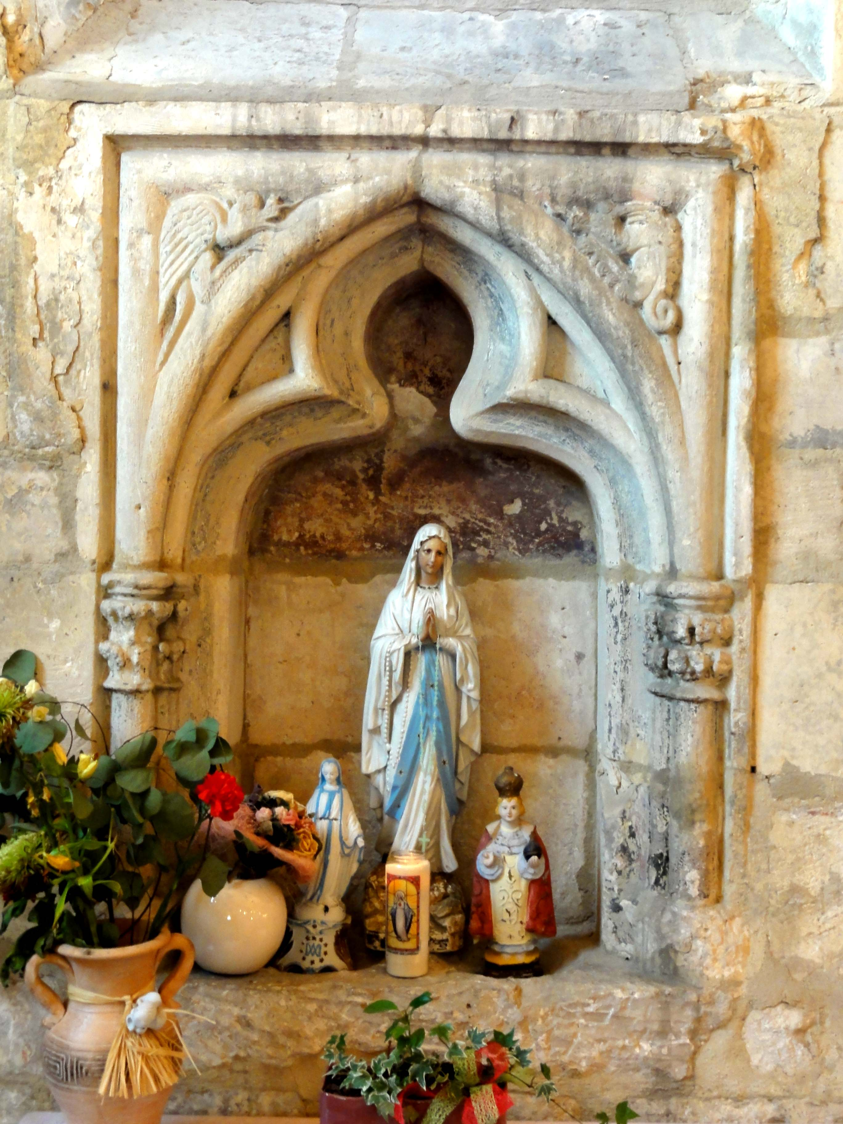 Chapelle sud, 2e travée, piscine liturgique côté sud.